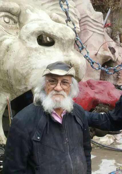 استاد ناصر وزیری در غار موزه وزیری